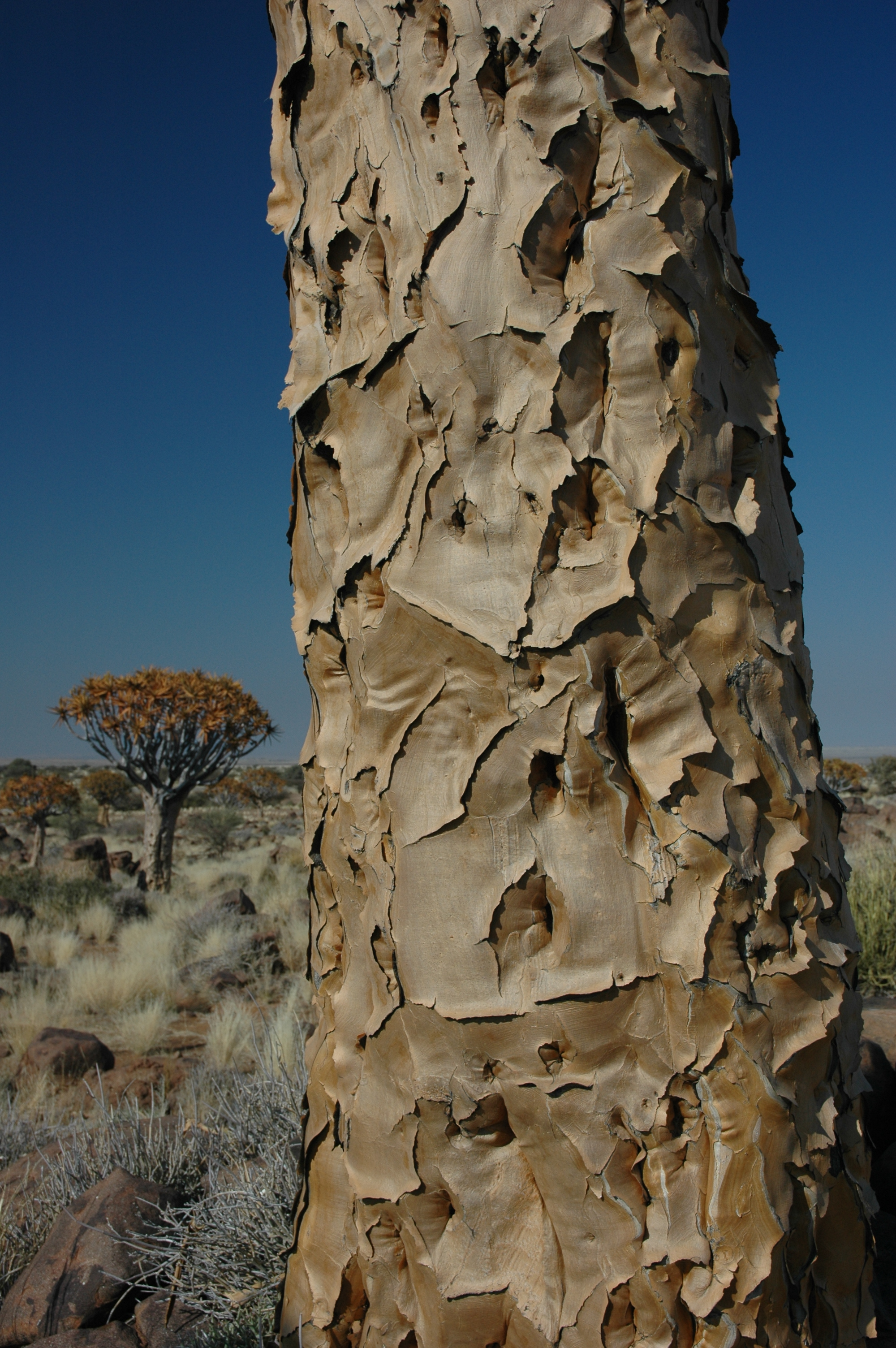 Namibie Quivertree Forest Photographie prise par GIRAUD Patrick